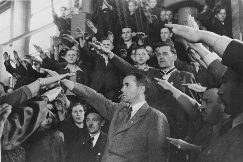 Für Verdienste um Munitionsfertigung mit dem Ritterkreuz des Kriegsverdienstkreuzes mit Schwertern ausgezeichnet Der Reichsminister für Rüstung und Kriegsproduktion, Albert Speer, spricht in einer durch Fliegerangriff beschädigten Munitionsfabrik den Arbeitern seinen Dank für die unerwartet schnelle Wiederingangsetzung der Produktion und die unverzügliche Wiederaufnahme der Arbeit aus. Zum Schluss des Appells überreicht Reichsminister Speer im Auftrag des Führers dem Leiter des Hauptausschusses Munition, Direktor Geilenberg - rechts von Reichsminister Speer - für seine Verdienste um die Munitionsfertigung das Ritterkreuz des Kriegsverdienstkreuzes mit Schwertern. Information added by Wikimedia users.